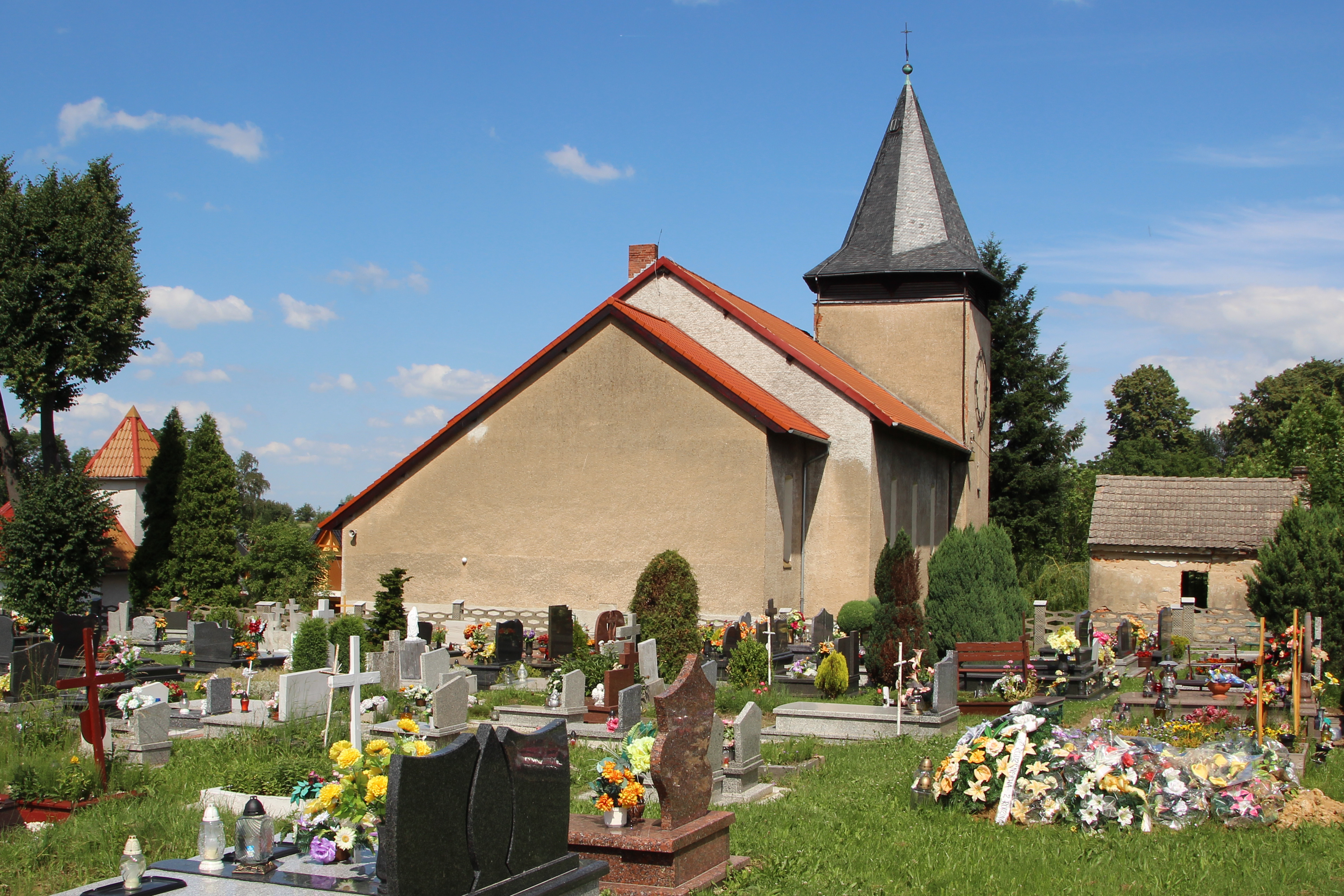 Konradów - rzymskokatolicki kościół filialny p.w. Chrystusa Króla, 1937.